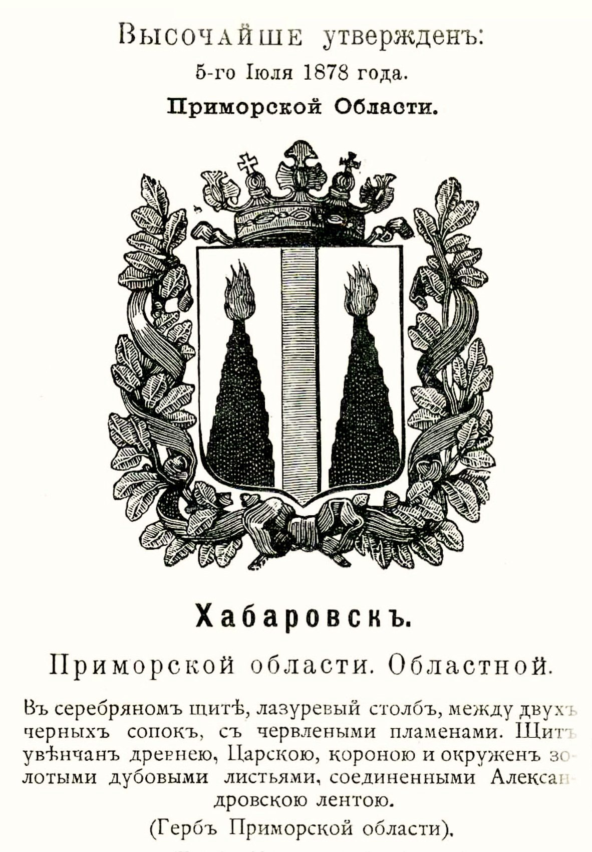 Official Russian Empire coat of arms Khabarovsk. Герб обласного города Российской Империи Хабаровск Приморской области 1878 года с официальным описанием в Гербовнике Винклера.